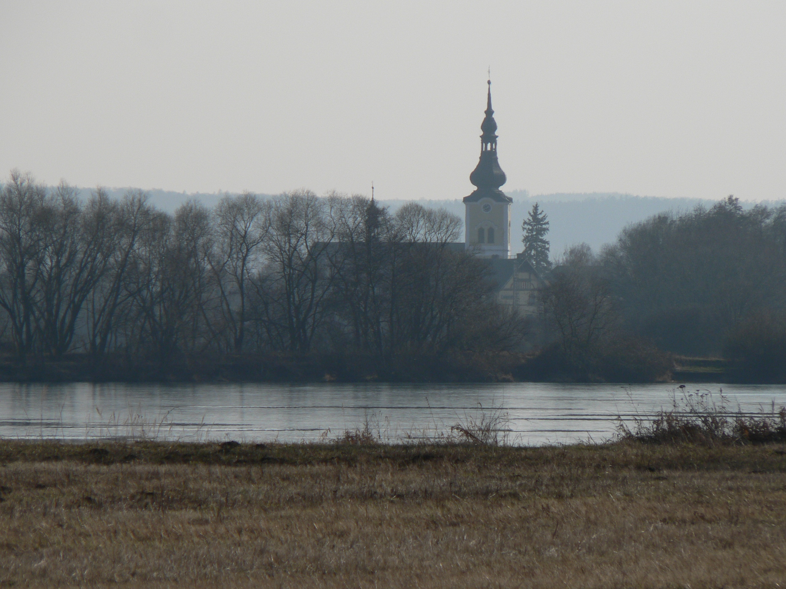 Kostel svatého Jiří (Moravičany)